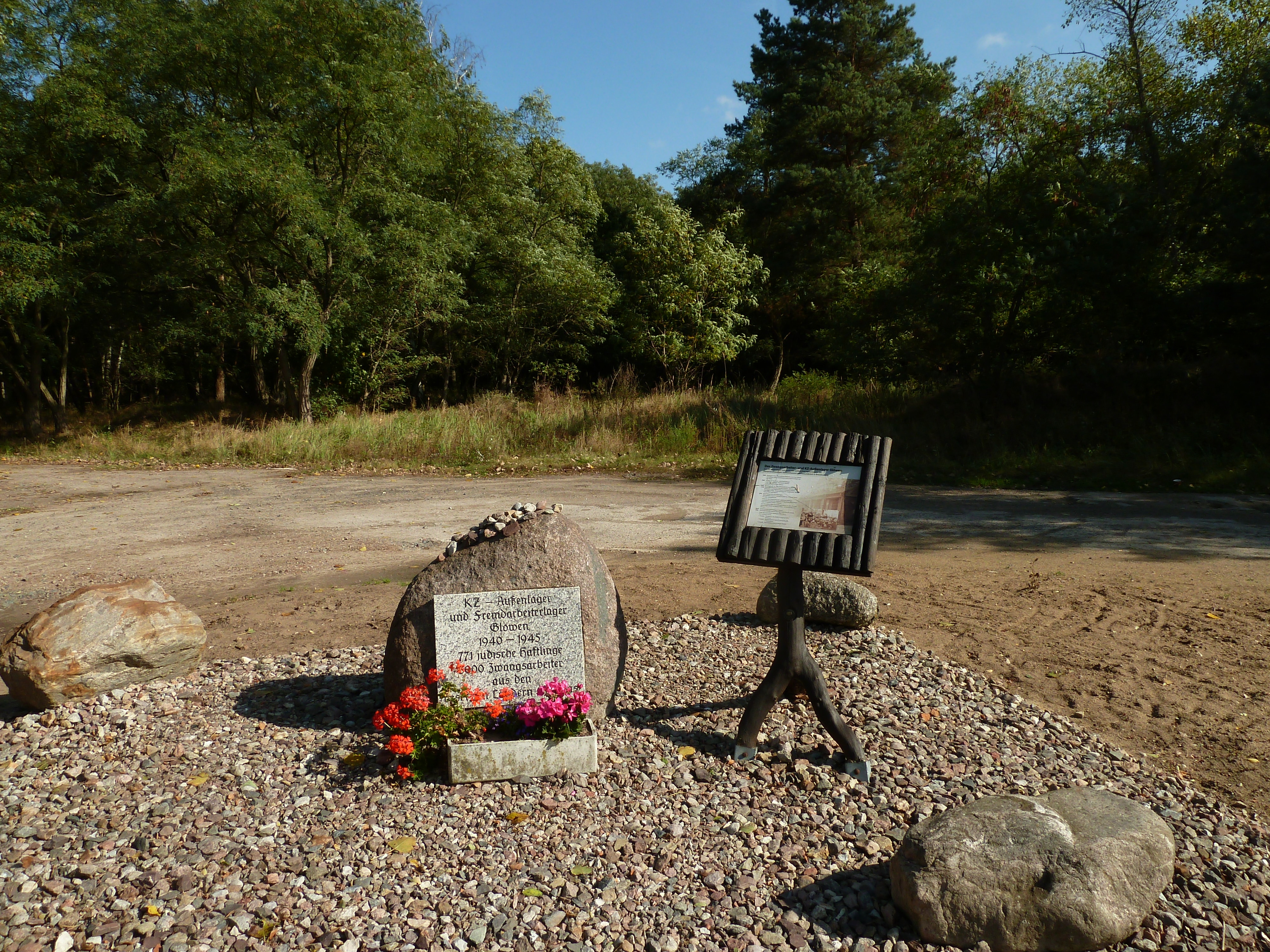 Denkstein für das Lager Glöwen (Außenstelle des Konzentrationslagers Sachsenhausen) zwischen Glöwen und Nitzow